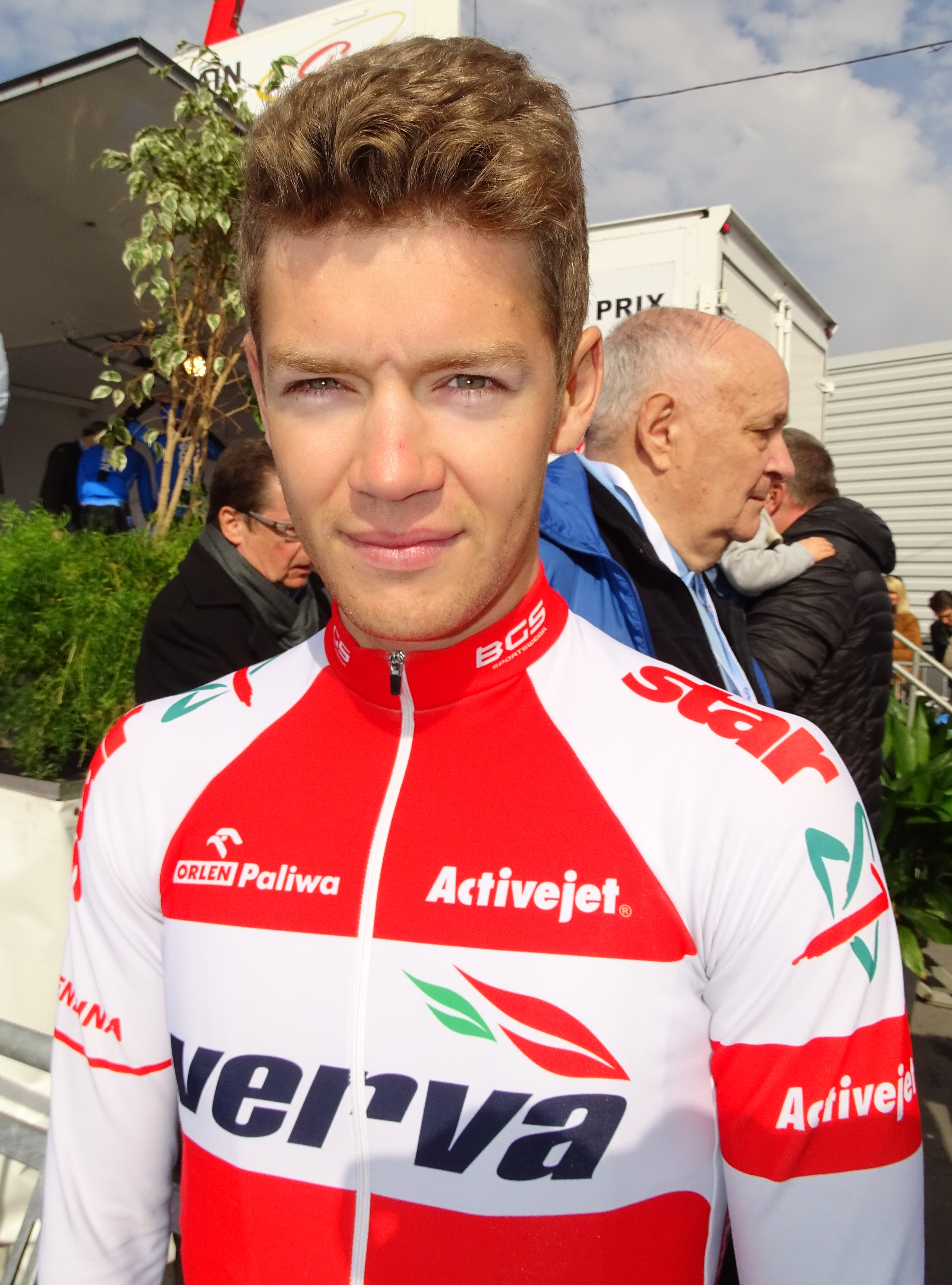 Reportage réalisé le jeudi 14 avril à l'occasion du départ et de l'arrivée du Grand Prix de Denain 2016 à Denain, Nord, Nord-Pas-de-Calais-Picardie, France.